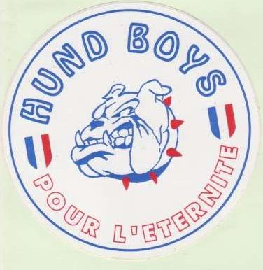 autocollant du Kop Of Hund Boys, groupe de supporters du SM Caen